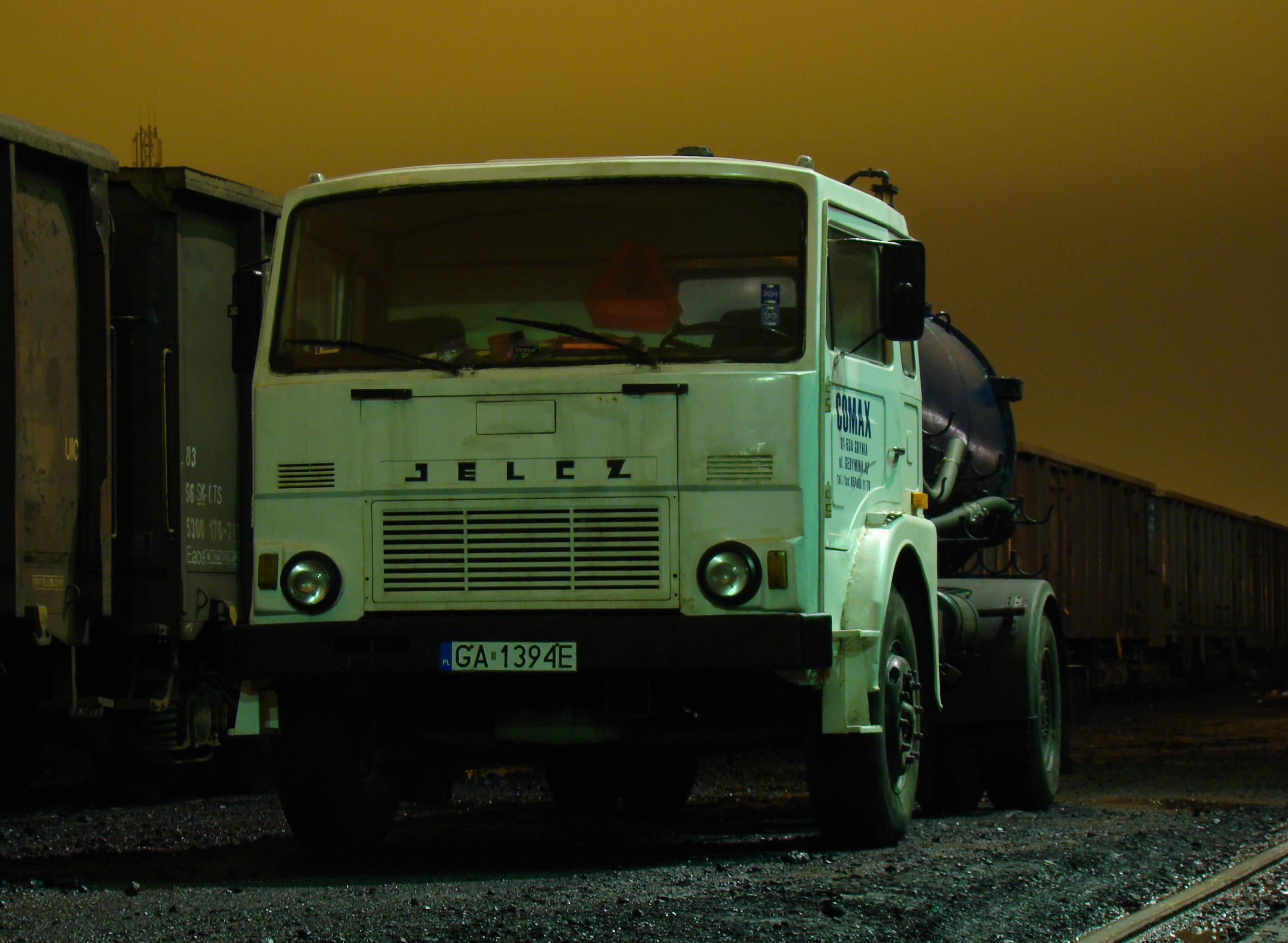 Jelcz 325 SK-7 (pojazd asenizacyjny), rok produkcji 1986.